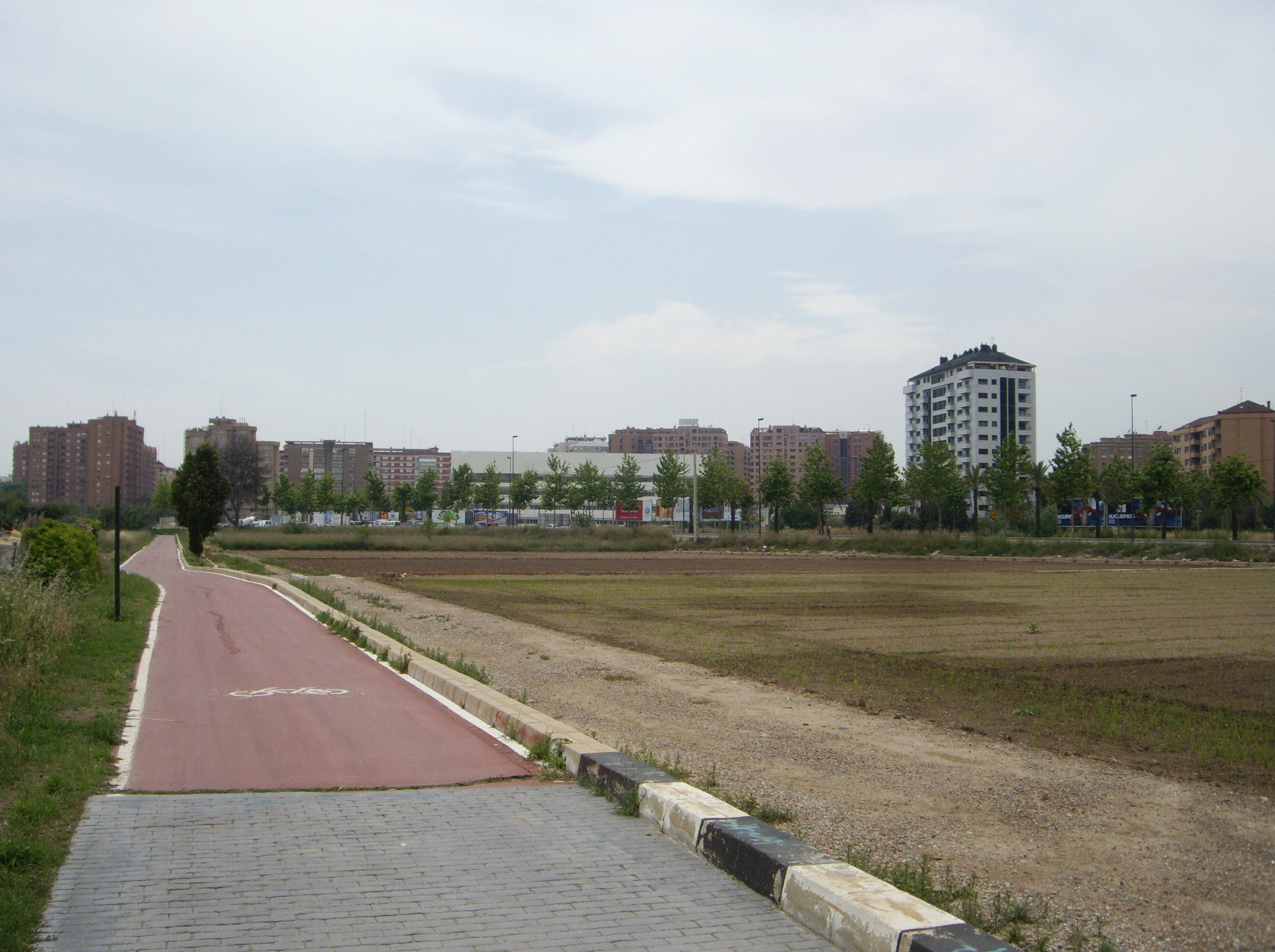 Carril bici, horta de Benimaclet.